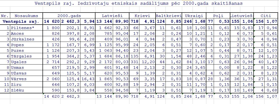 результаты переписи населения Латвии ни 01.04.2000